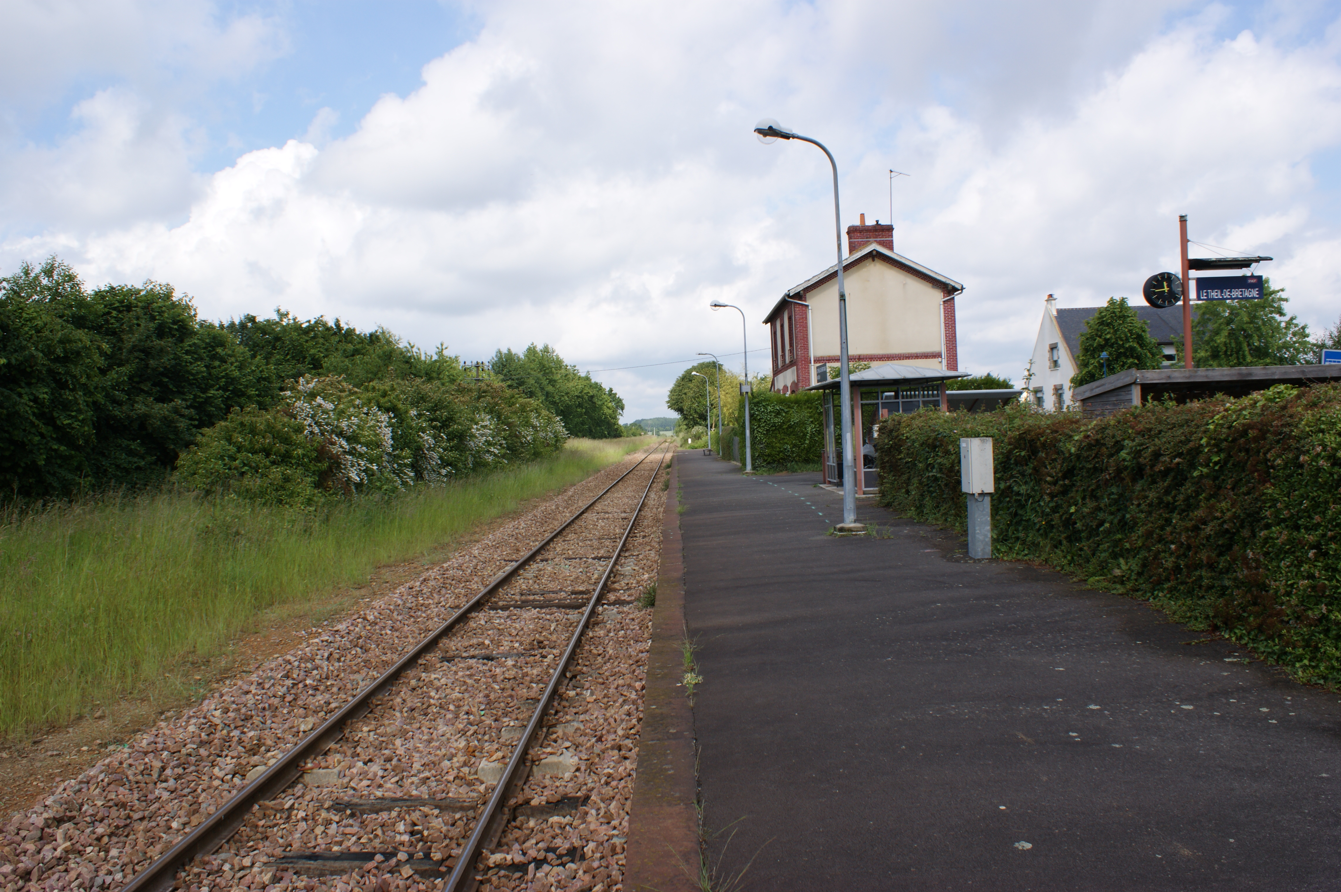 Gare du Theil-de-Bretagne, vue d'ensemble de la halte.